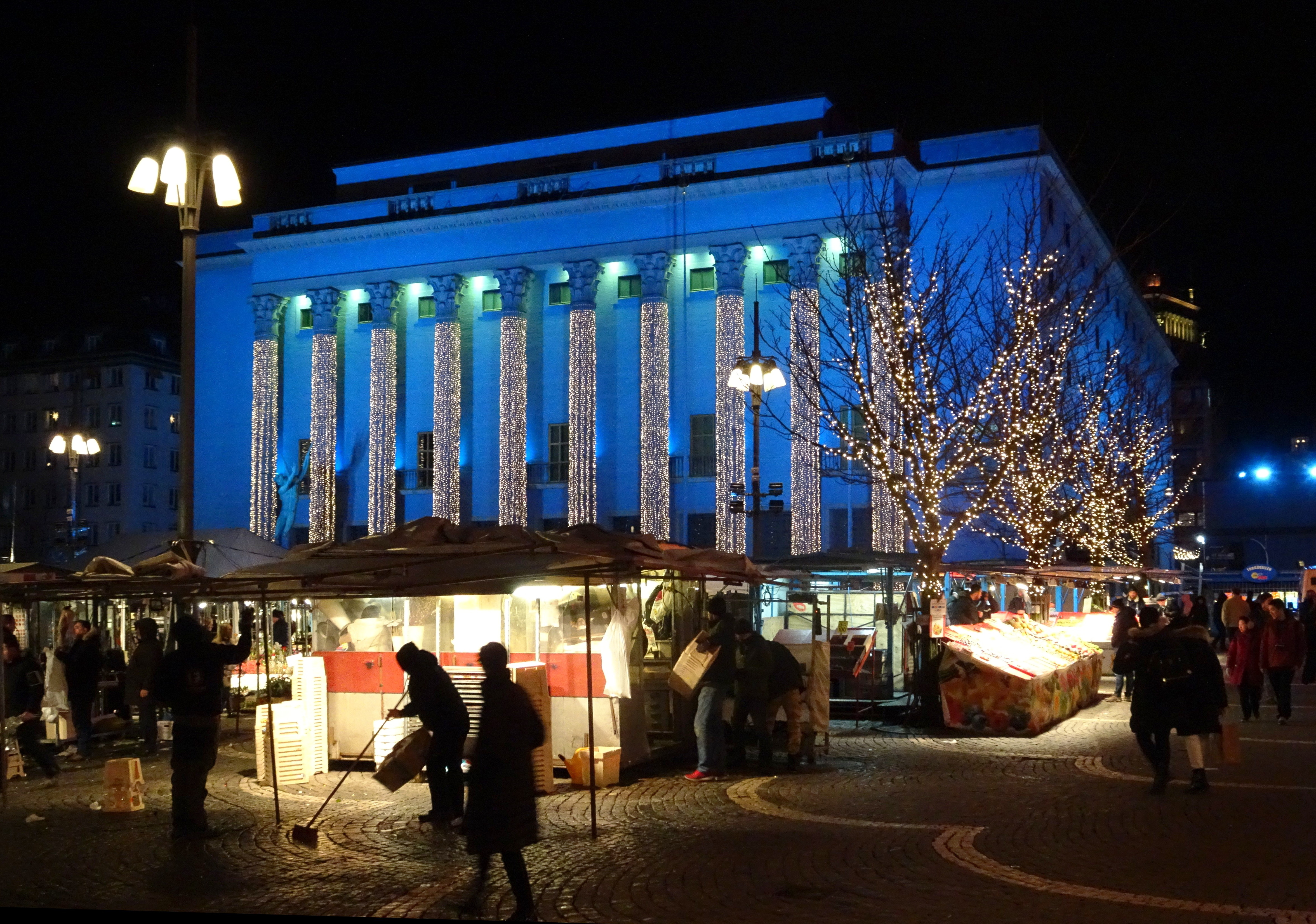 Hötorget och Konserthuset i festbelysning